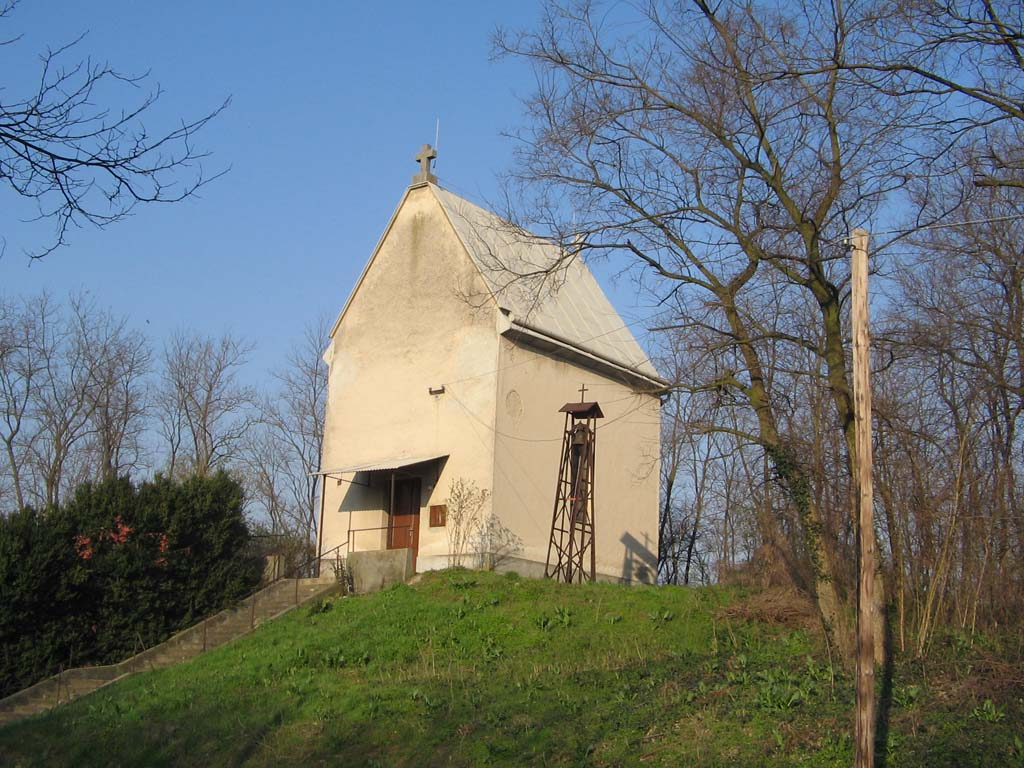 Fülöp-Bánházai kápolna, Hajdú-Bihar megye